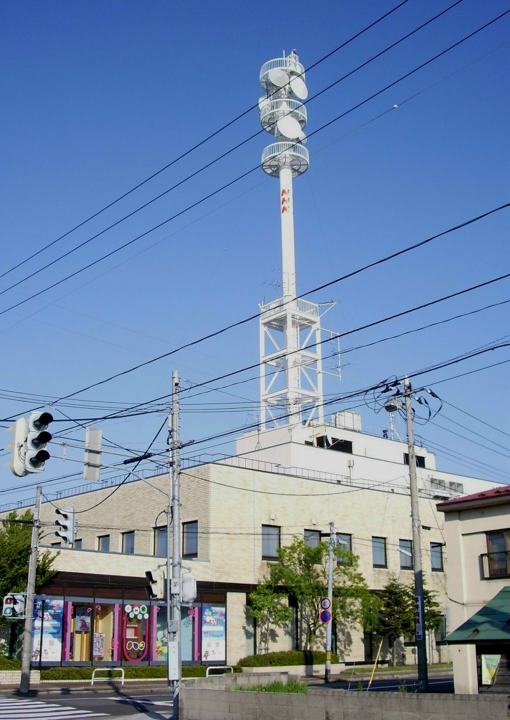 NHK-Aomori（NHK青森放送局）